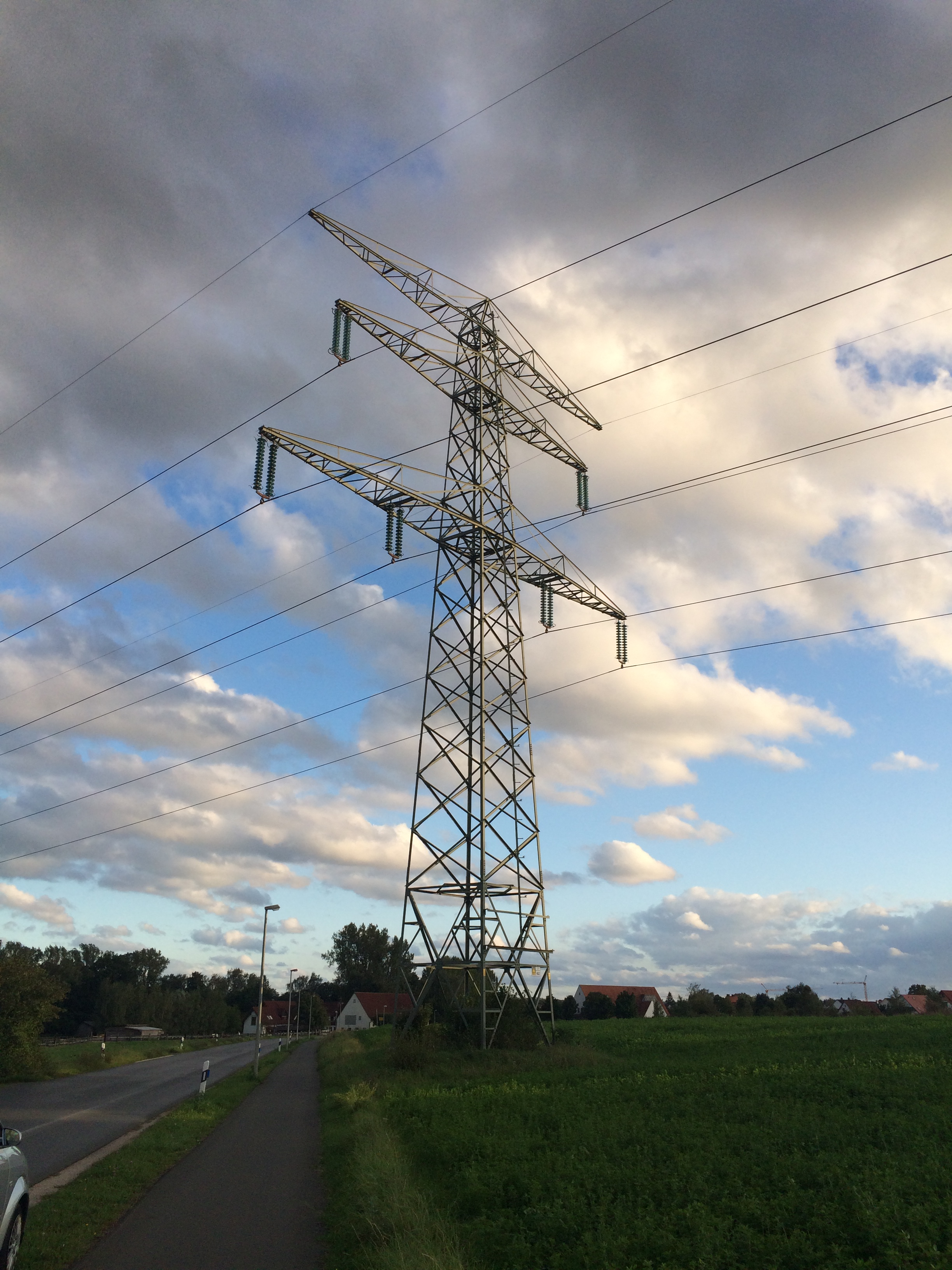 Originalmast der Reichssammelschiene bei Baad in Neunkirchen am Brand, Landkreis Forchheim